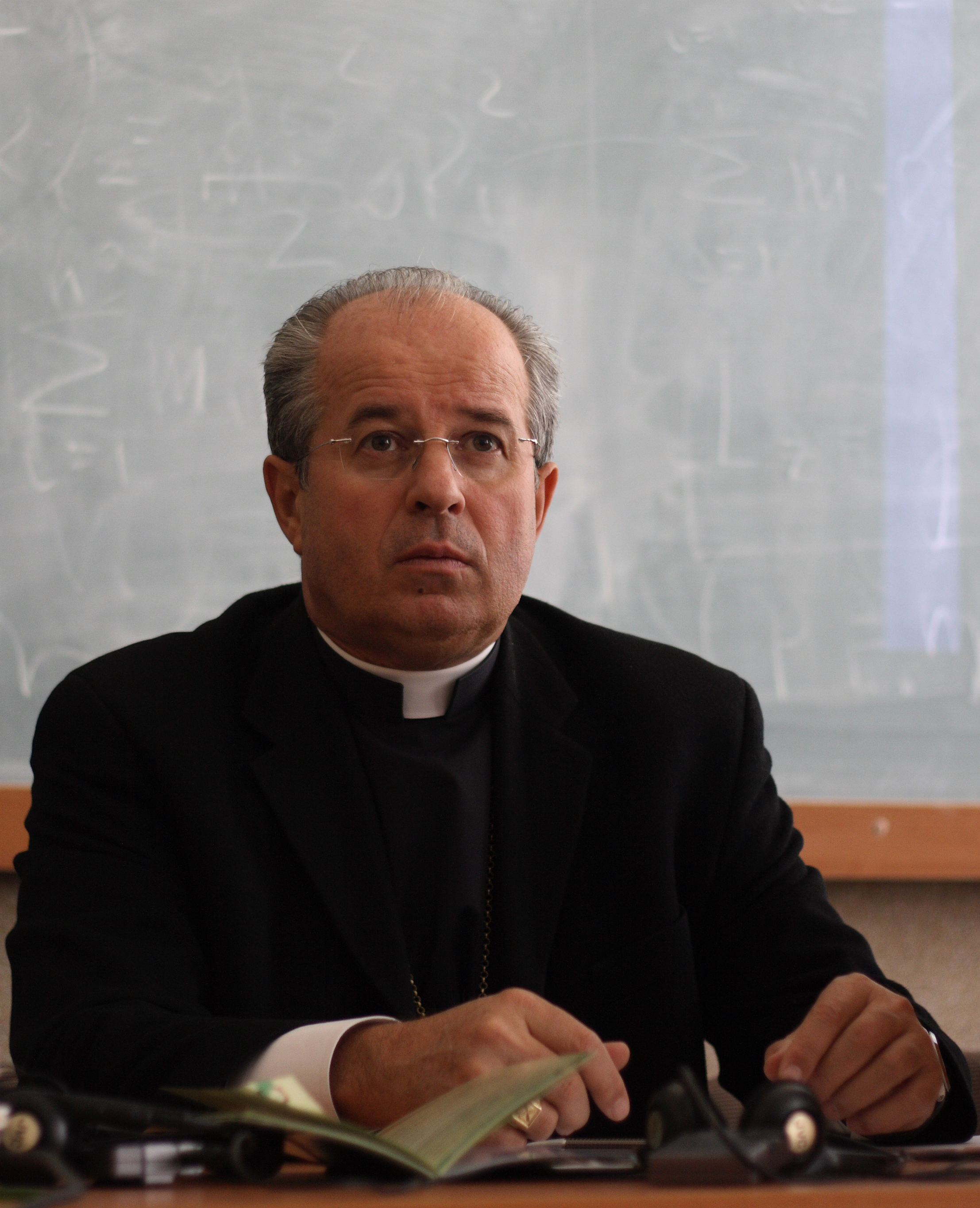 Архиепископ Иван Юркович